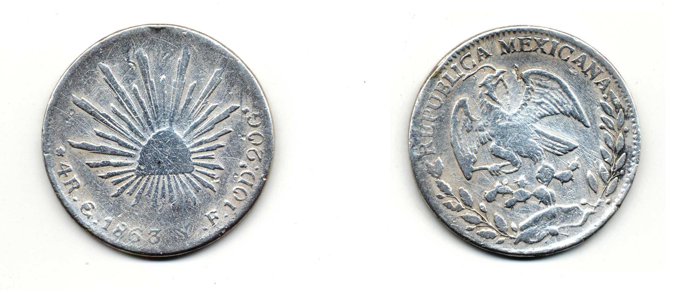 Moneda de 4 reales acuñada en la ceca de México en 1863.